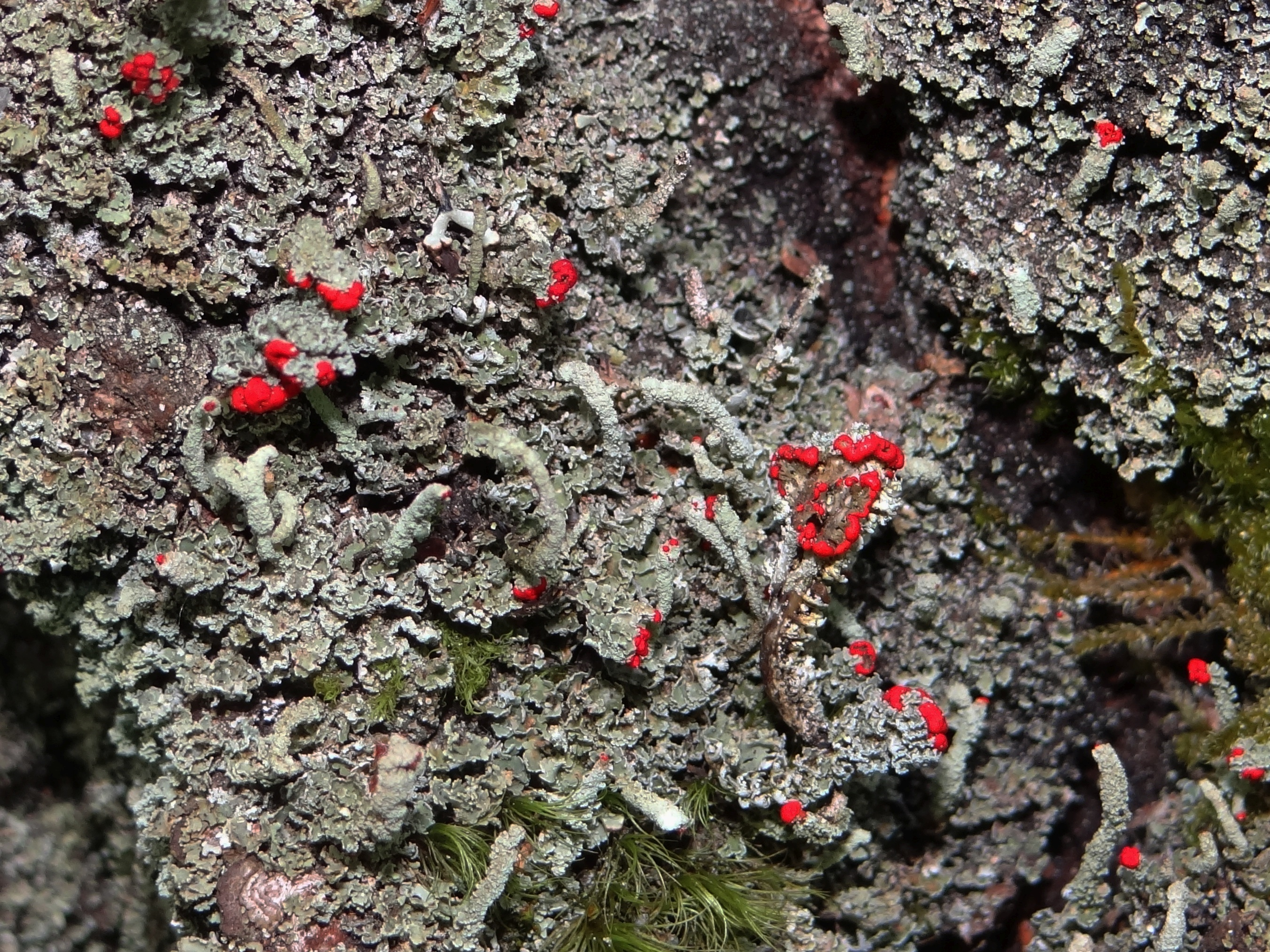 Cladonia macilenta (location: Poland, Rajbrot)